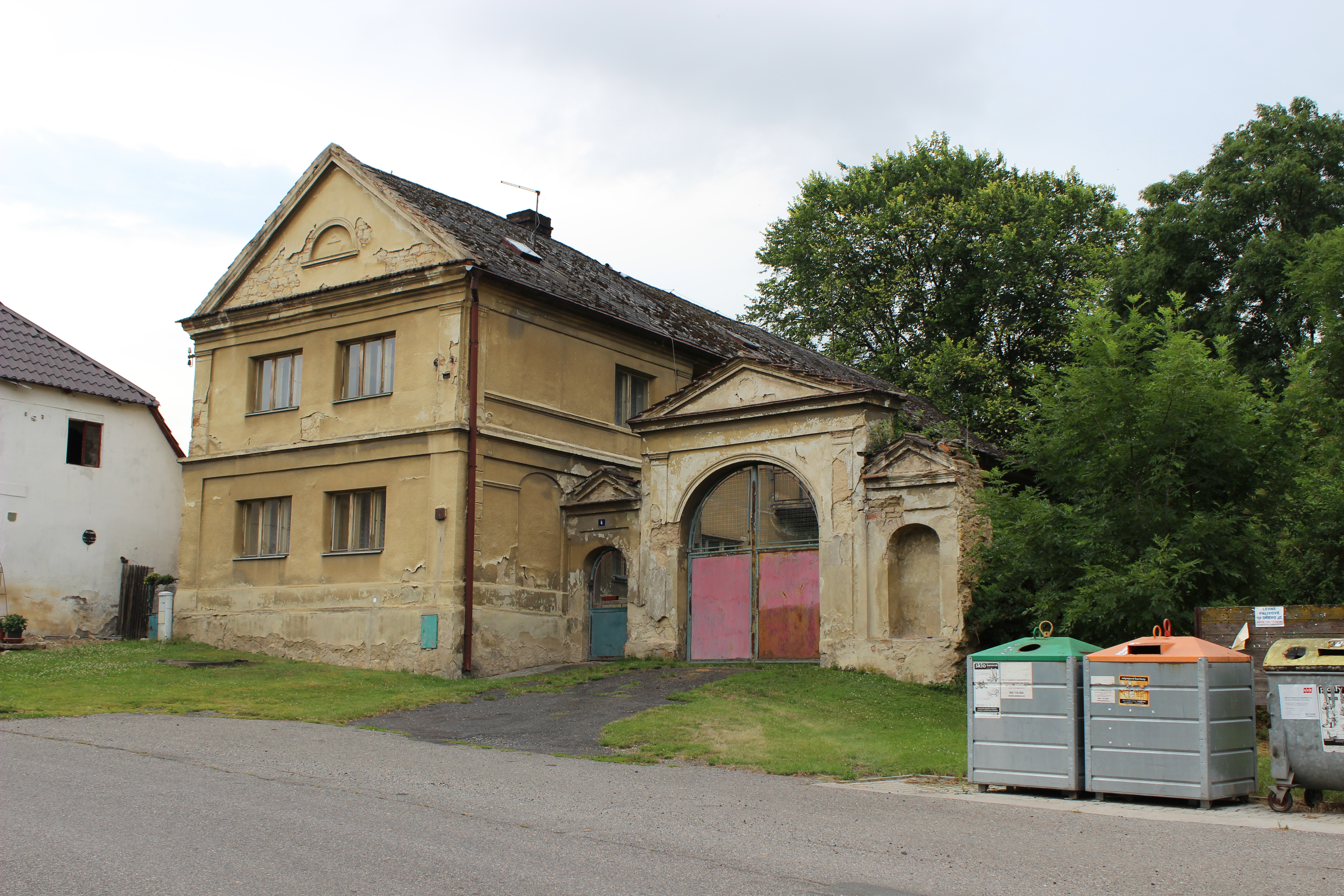 Dům číslo popisné 4 v Sušně, části Kropáčovy Vrutice v mladoboleslavském okrese.